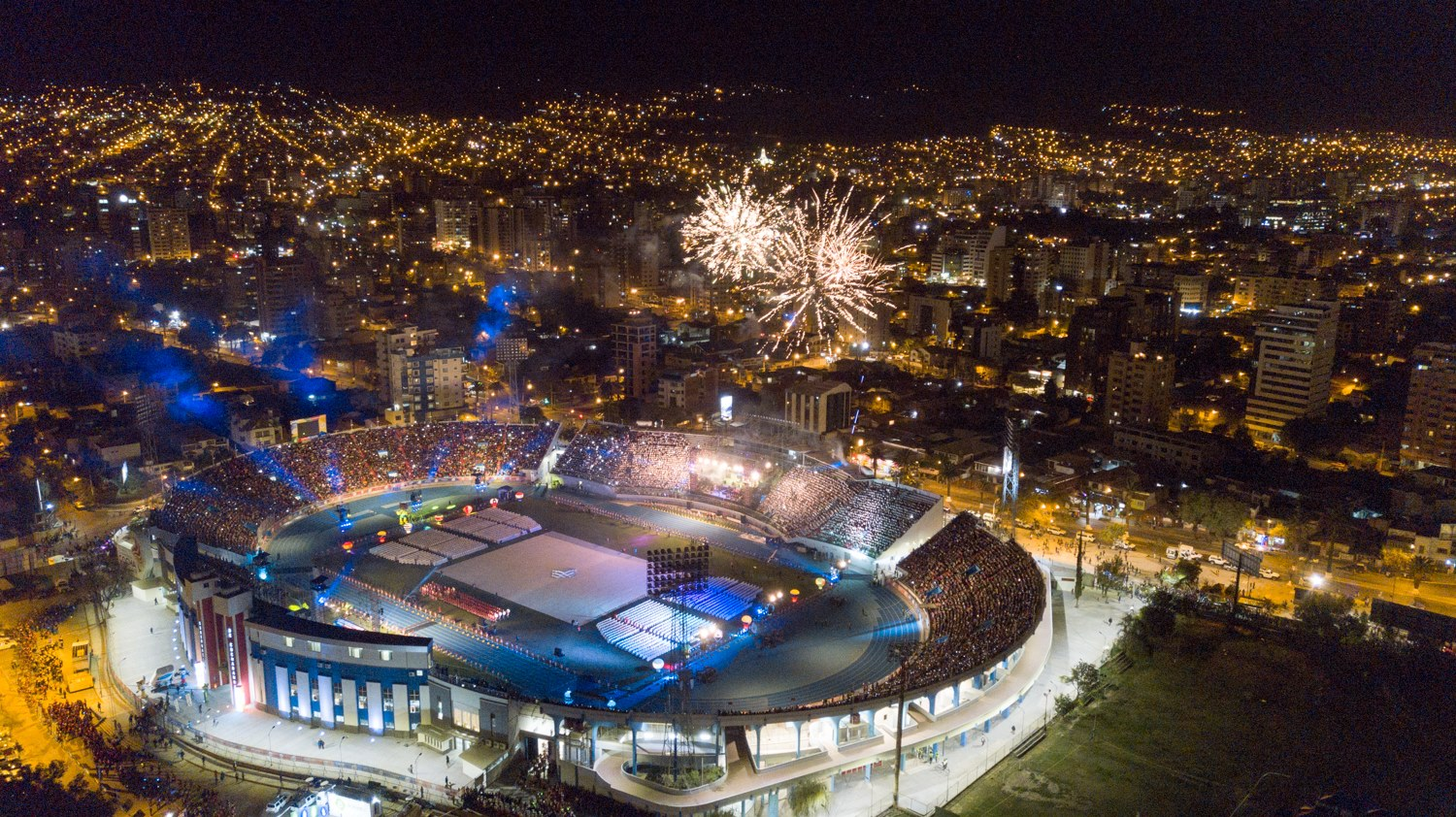 Vista Aerea de la Inauguracion de los Juegos Suramericanos Cochabamba 2018